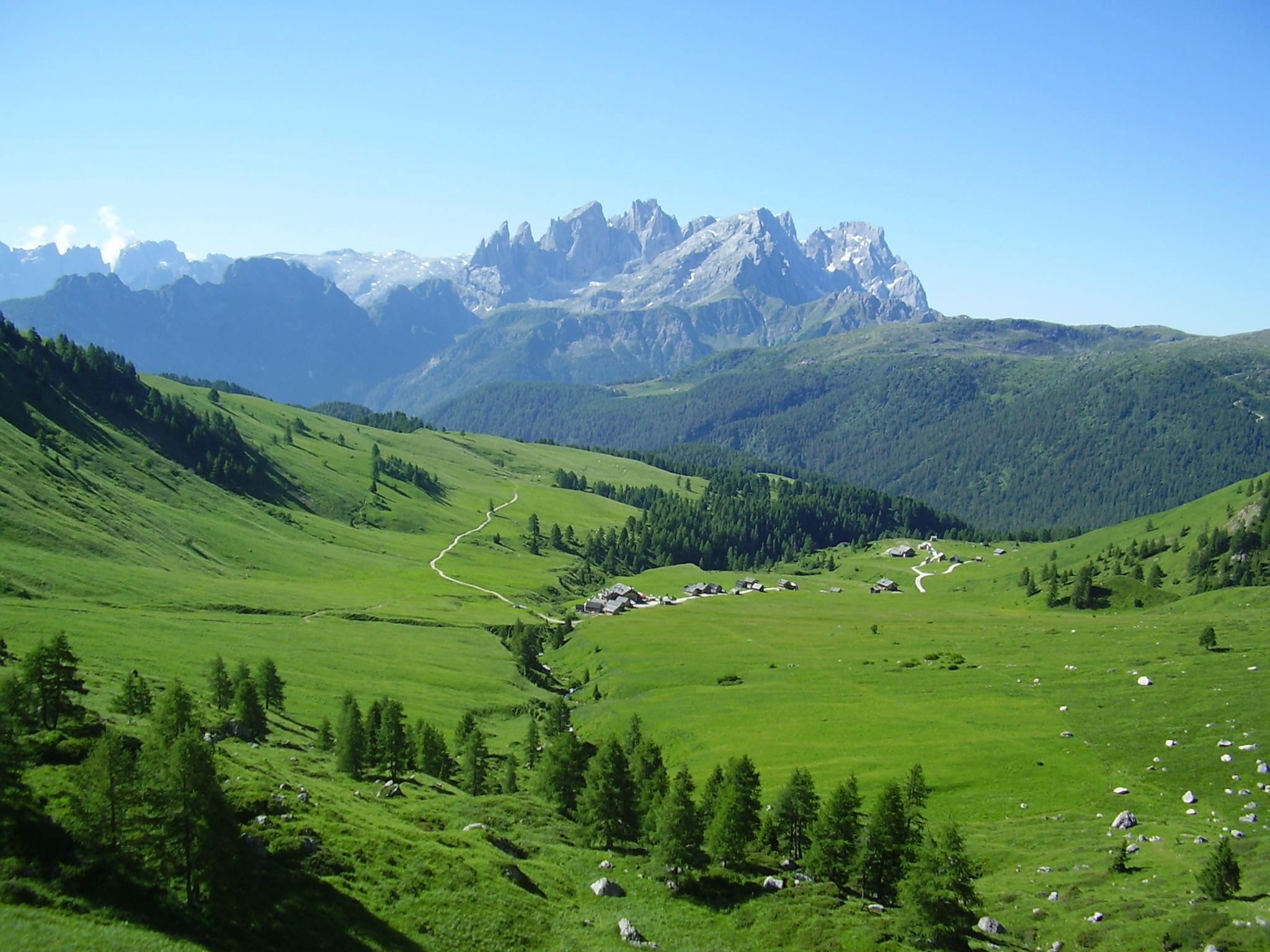 fuciade